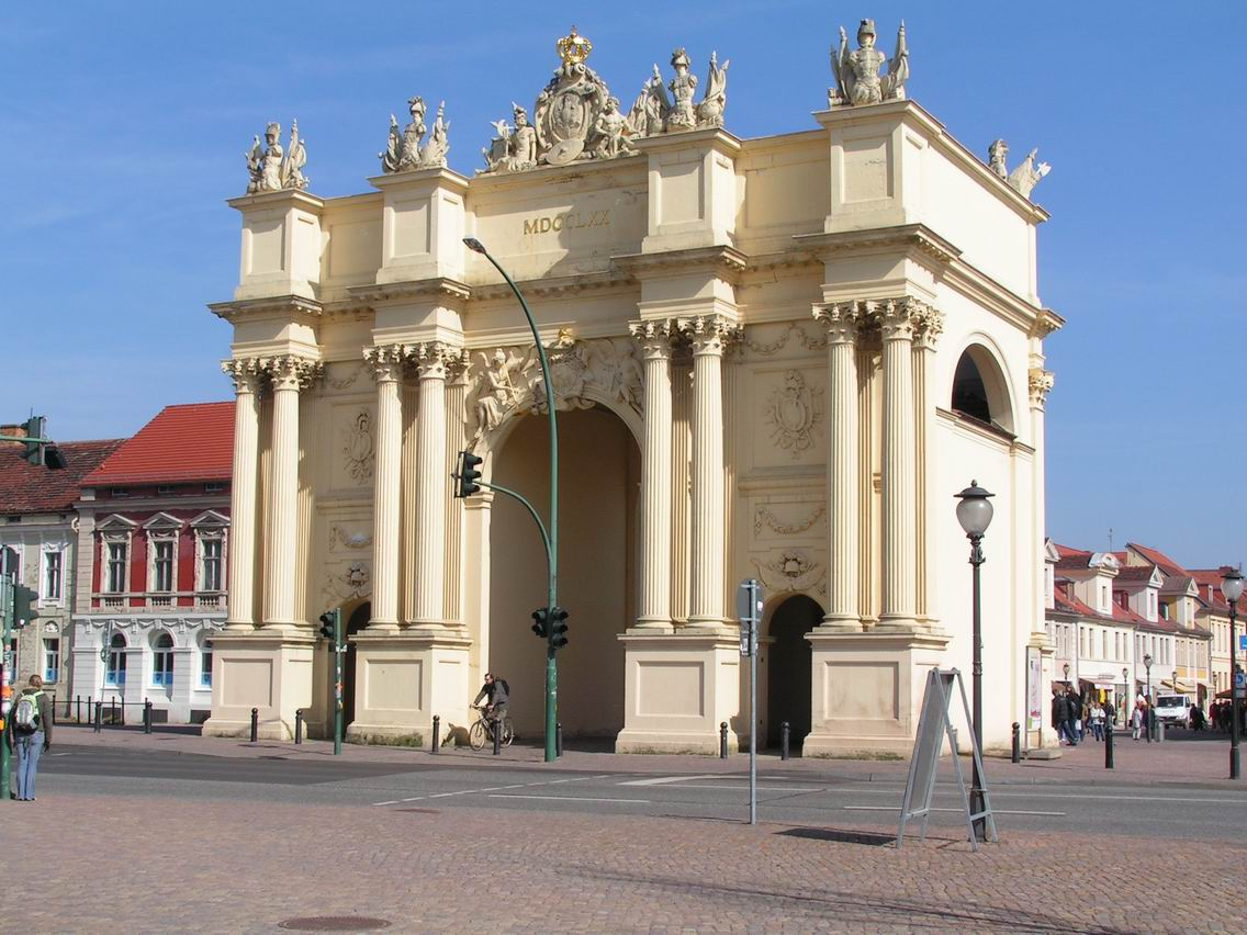 Potsdam, Brandenburger Tor Fotografiert von Dieter Brügmann am 22. März 2005.